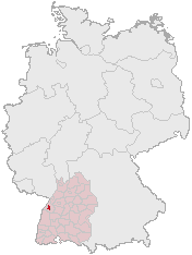 Baden-Baden in Deutschland